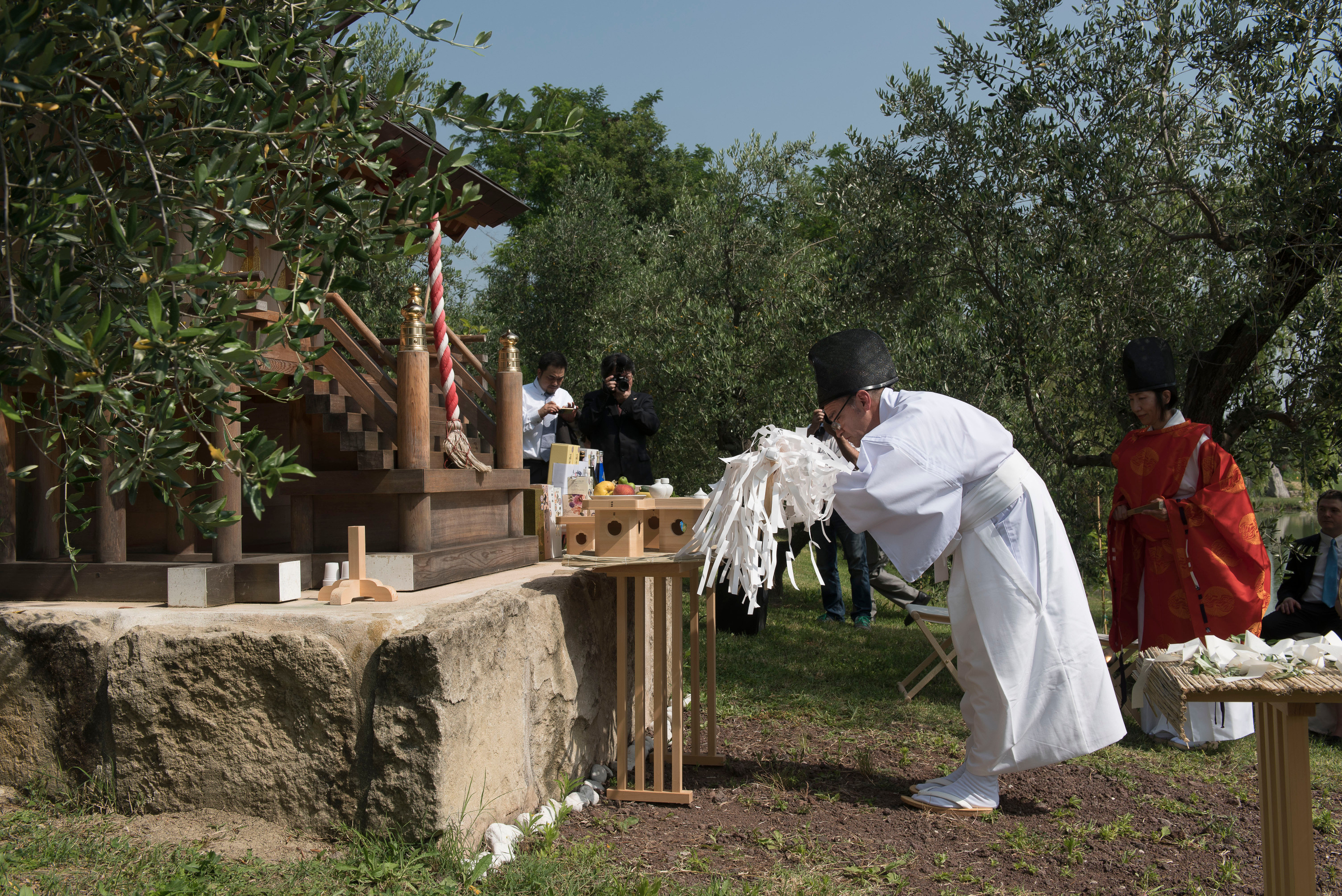 il Guji Francesco Brigante durante una cerimonia al santuario San Marino Jinja